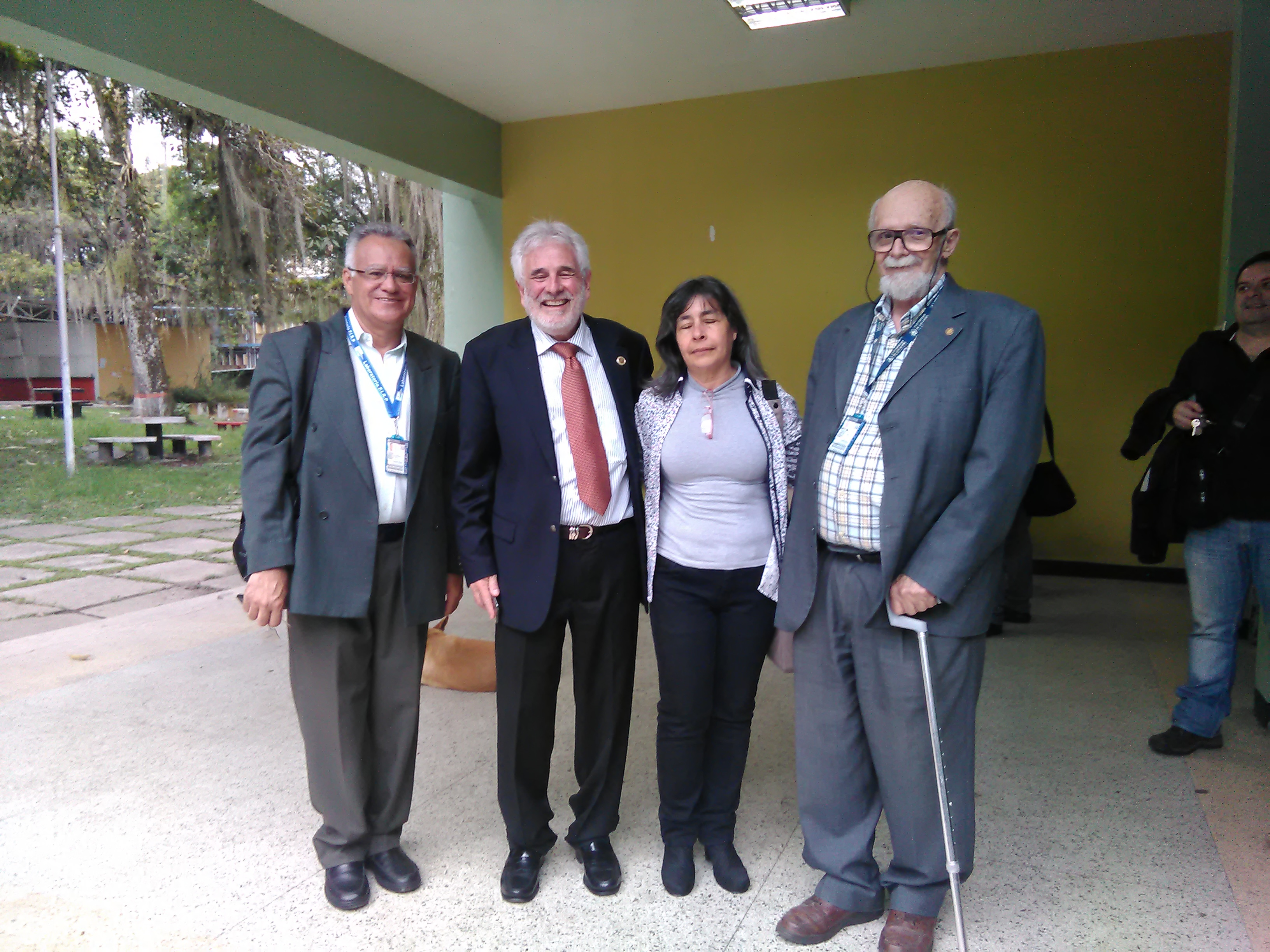 Jean-Louis Salager